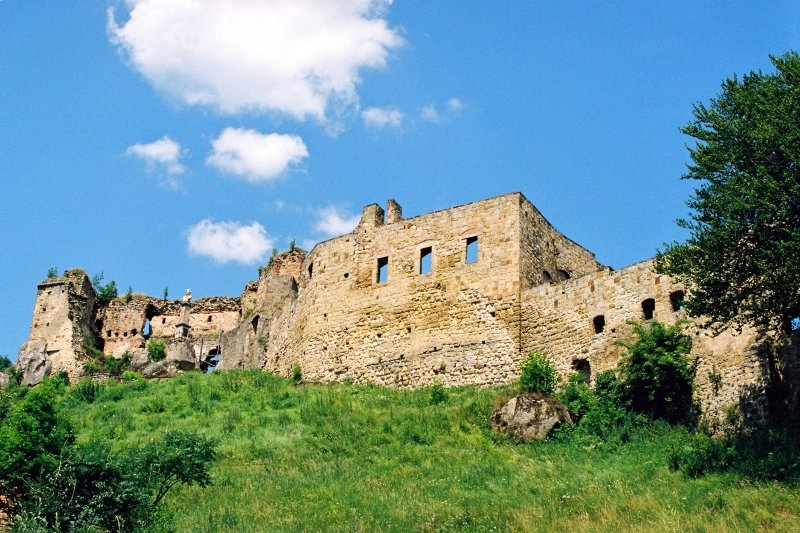 Autorem zdjęcia jest Przemysław Niepokój-Hepnar